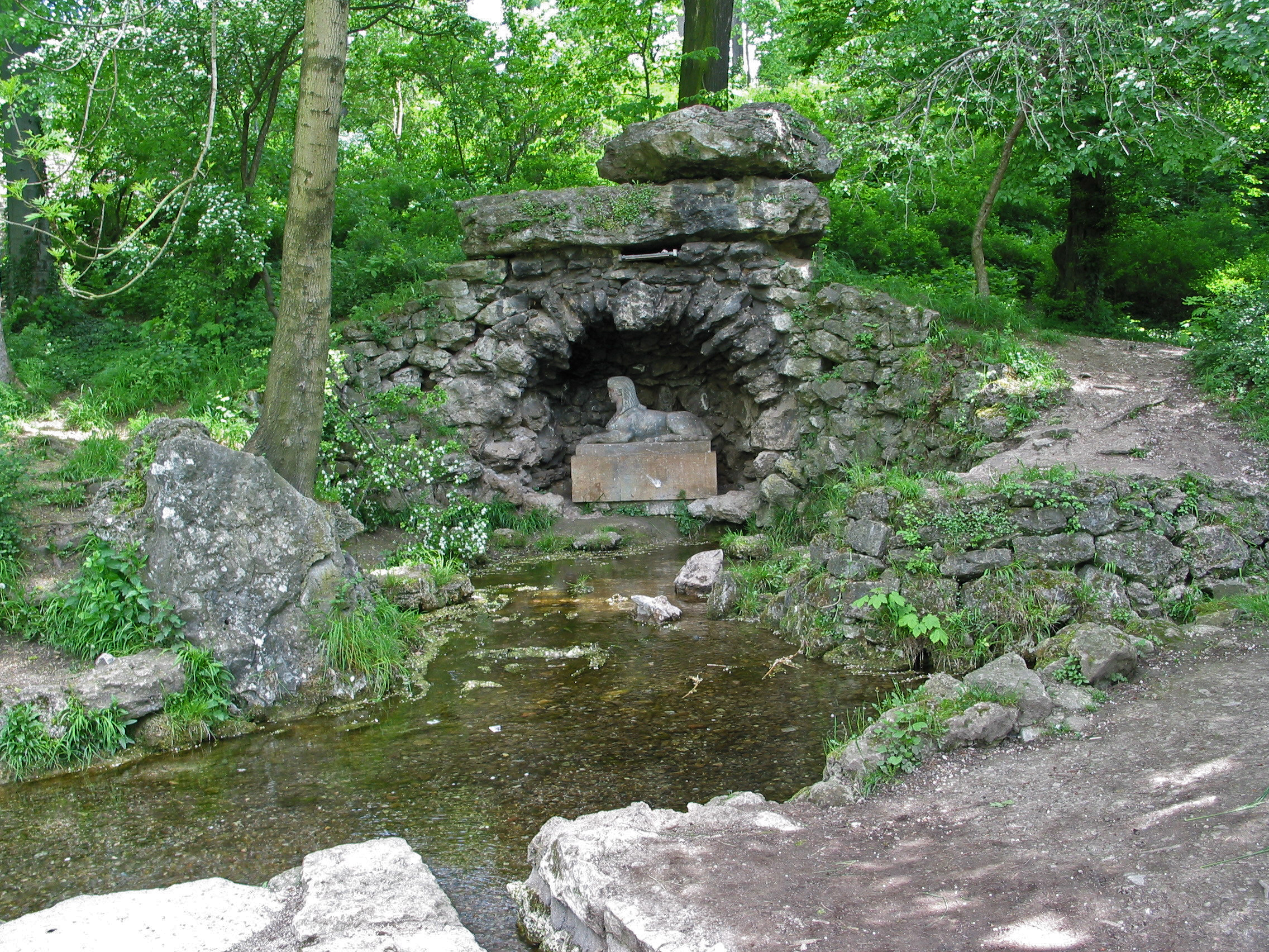 Die Leutraquelle mit Sphinxgrotte und Sprudelquelle wurde 1784–86 errichtet und ist Teil der von Herzog Carl August und J. W. Goethe entworfenen Parkgestaltung im Park an der Ilm in Weimar.